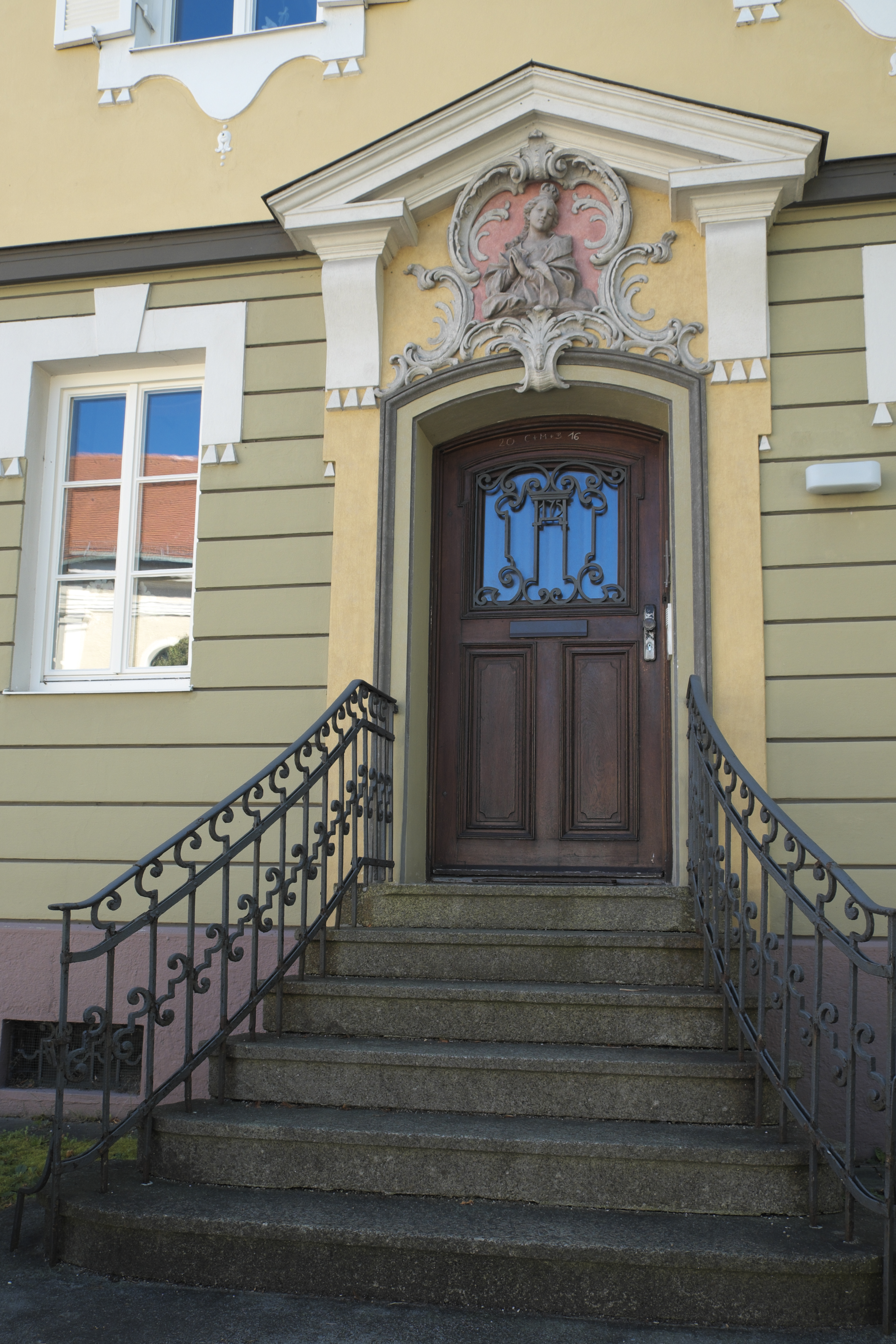 Pfarrhaus in Peißenberg im Landkreis Weilheim-Schongau (Bayern/Deutschland)